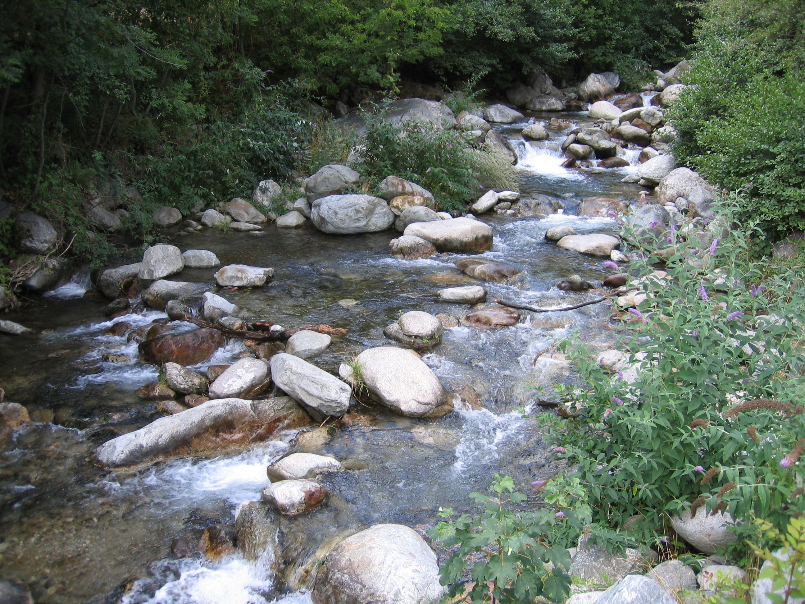 Photo de la Vésubie, prise à Saint-Martin-Vésubie (Alpes-Maritimes, France)